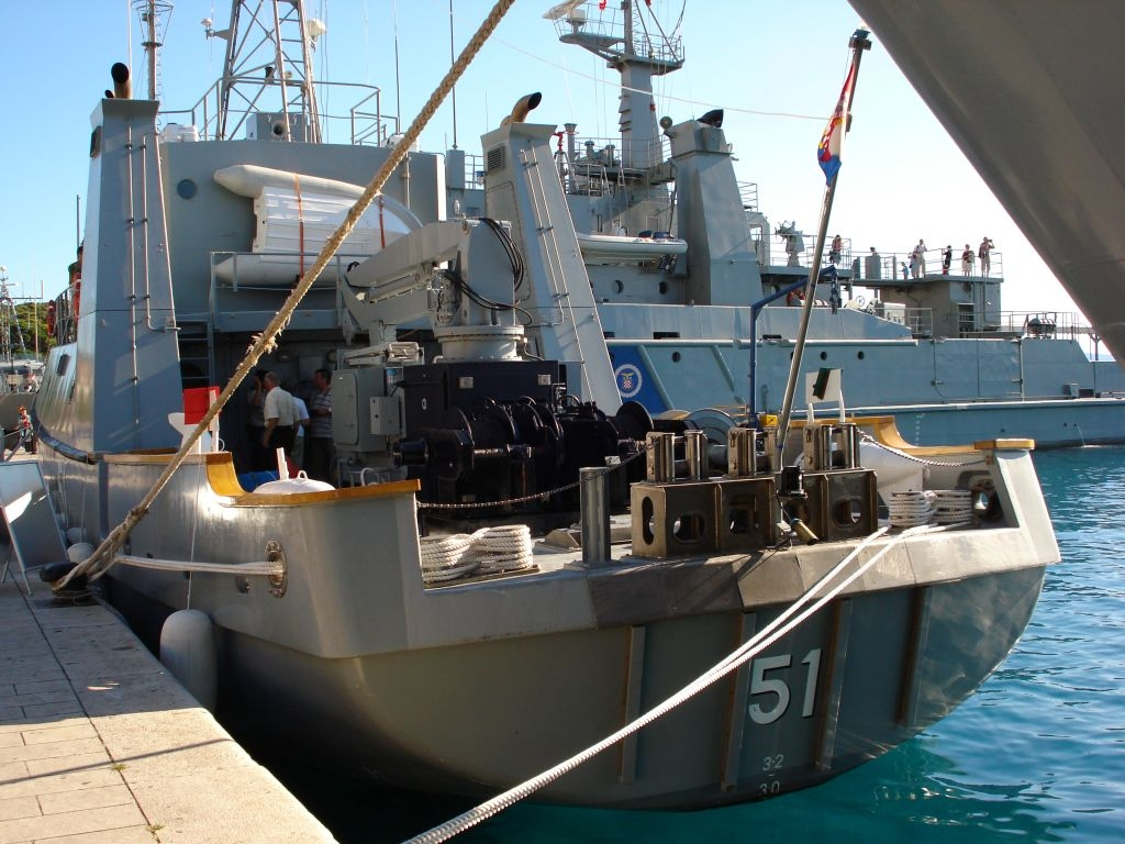 LM-51 Korčula